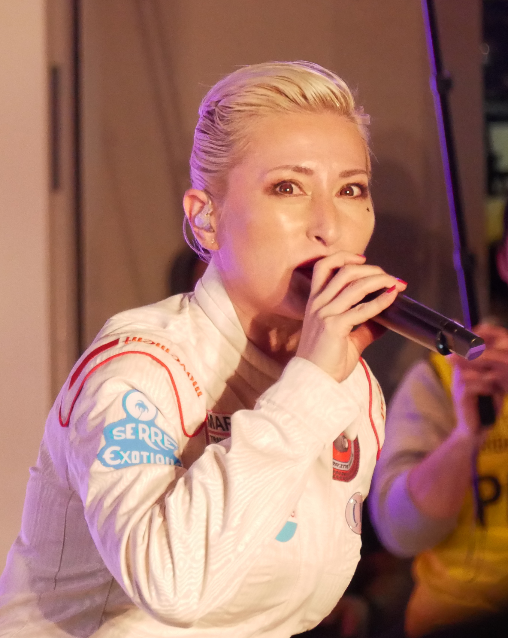 m-flo's Lisa Panasonic Lumix DMC-GX7 Mark II